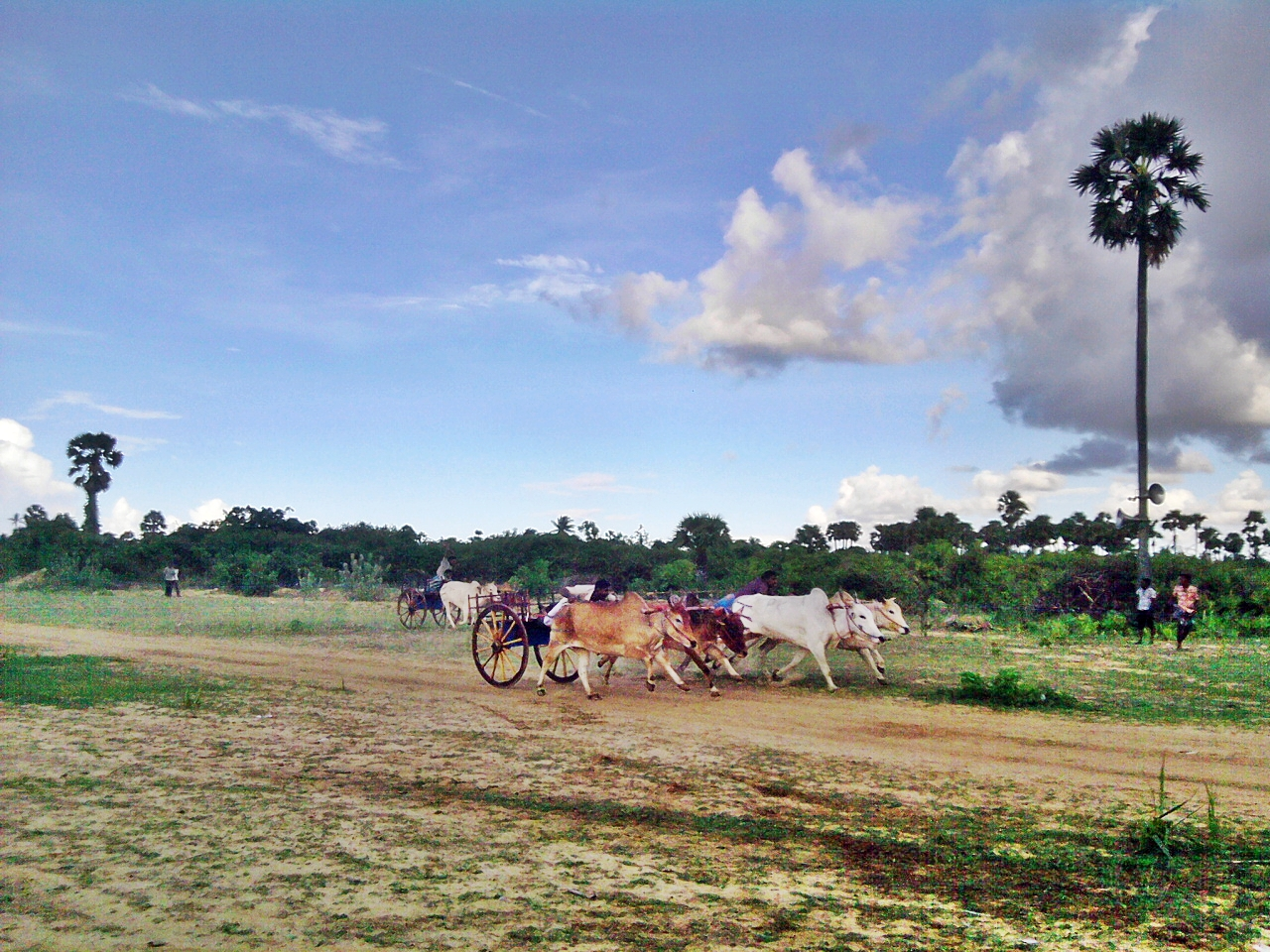 காளை மாடுகள் ஓடும் காட்சி. A bullock cart race